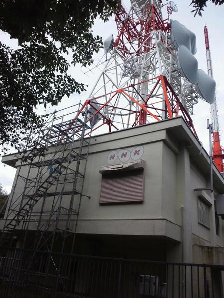 NHK・IBC新山デジタルテレビ送信所